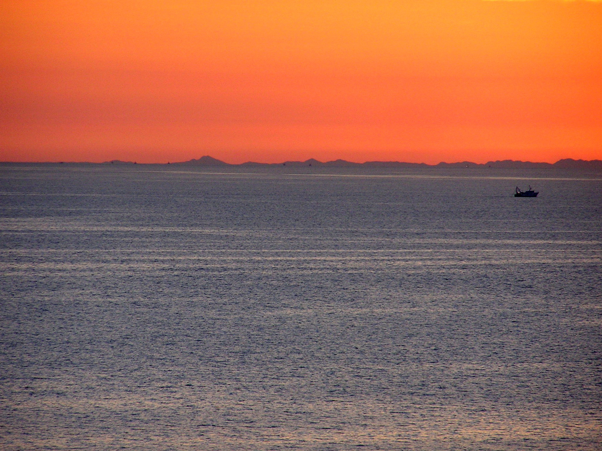 Veduta della costa dalmata da via Panoramica di Ancona